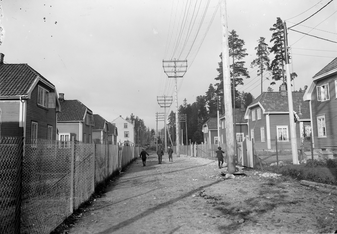 Gate i Grønnbyen, Notodden. Arbeiderboliger anlagt 1906–1910